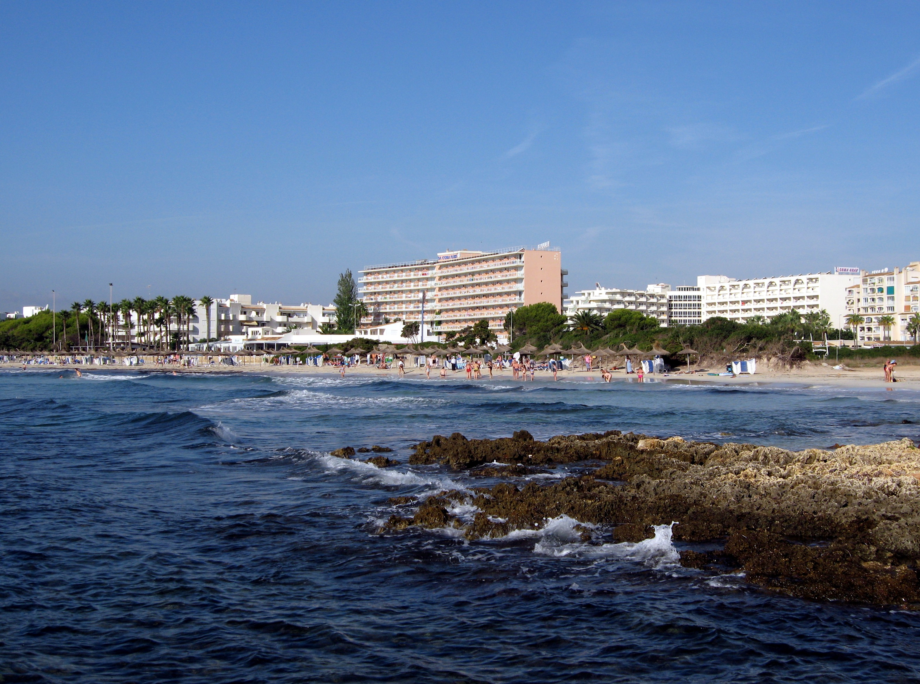 Sa Coma, Sant Llorenç des Cardassar, Mallorca, Spain